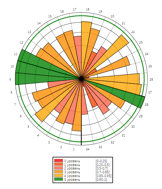 Скриншот итоговой диаграммы оценки соответствия требования СТО БР ИББС, выполненной при помощи DS Audit